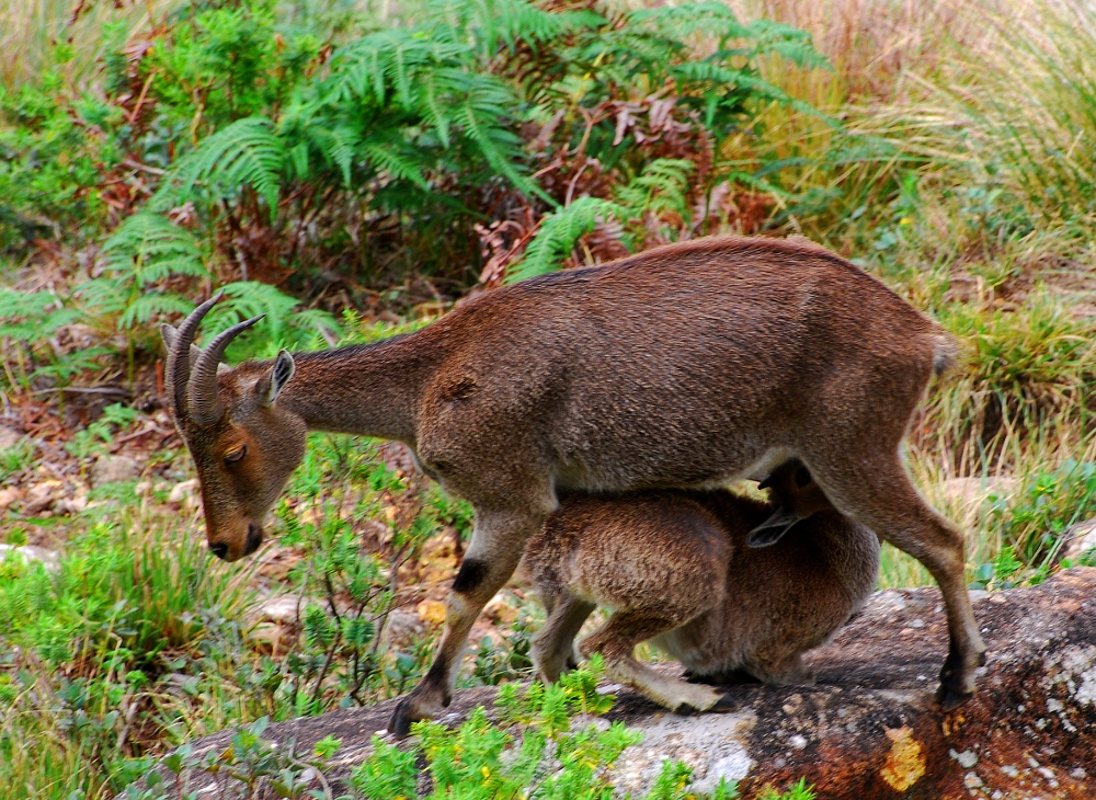 മുലയൂട്ടുന്ന വരയാട് ഇരവികുളം ദേശീയോദ്യാനത്തിൽ പകർത്തിയത്